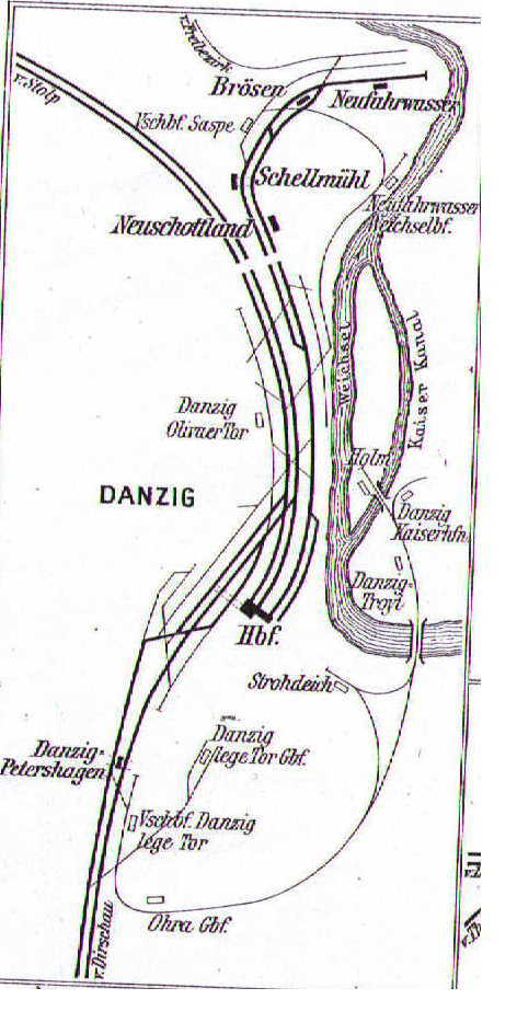 Schematische Übersicht über die Bahnstrecken in Danzig im Jahr 1914